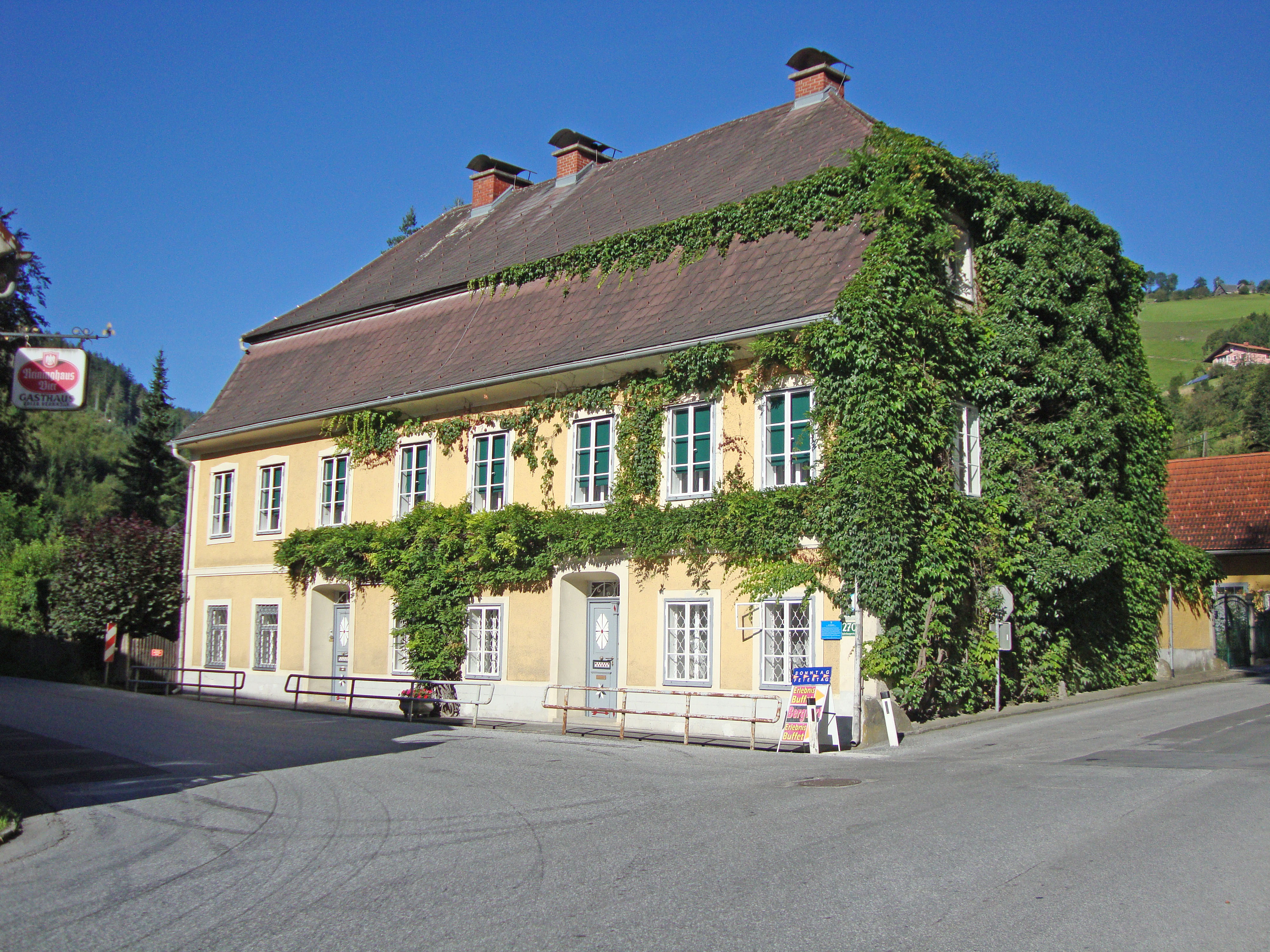 Hammerherrenhaus, Krenhof